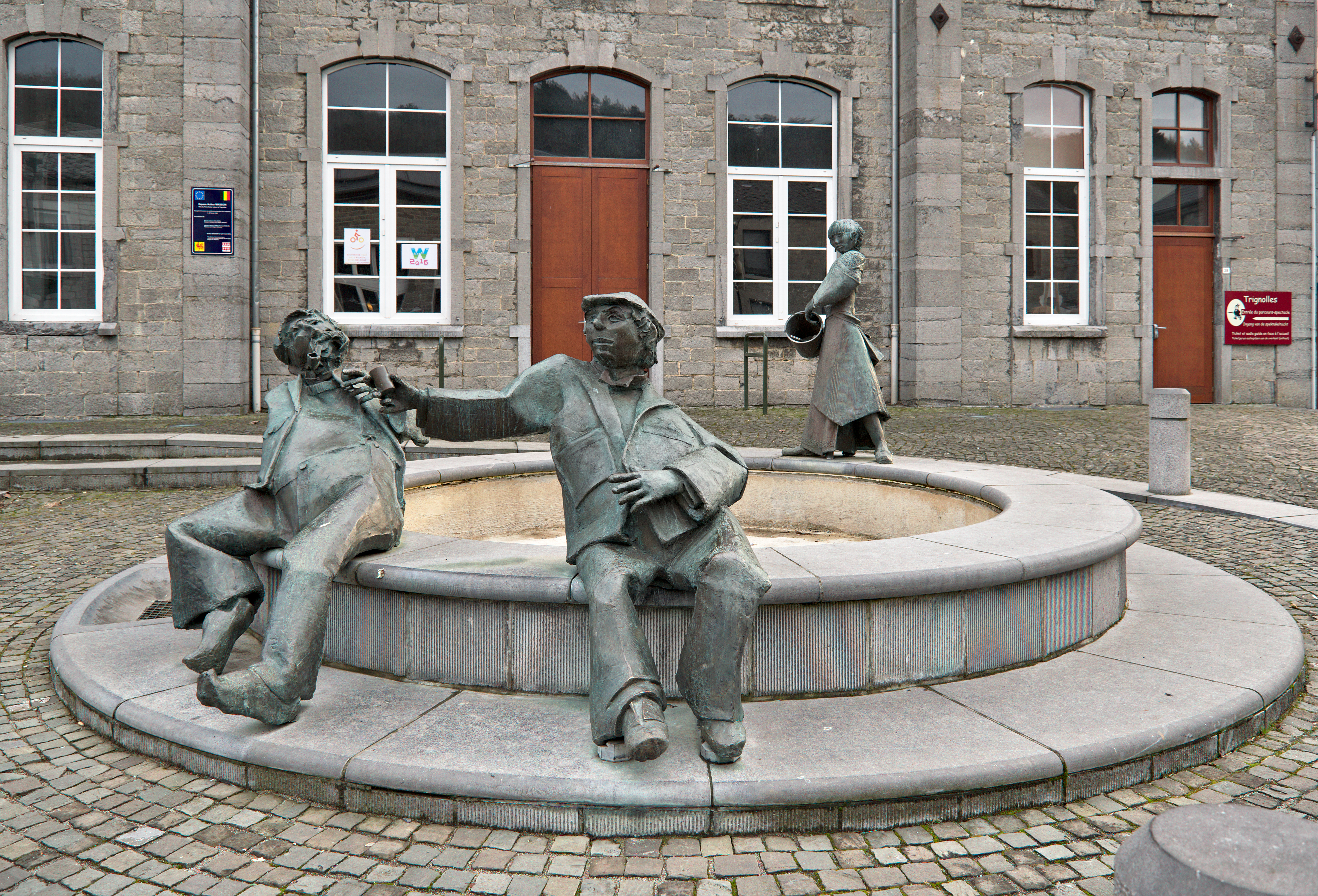 Fontaine de Treignes, la "Toinade" par Claude Rahir, devant l'espace Arthur Masson This photo of immovable heritage has been taken in the Walloon Region